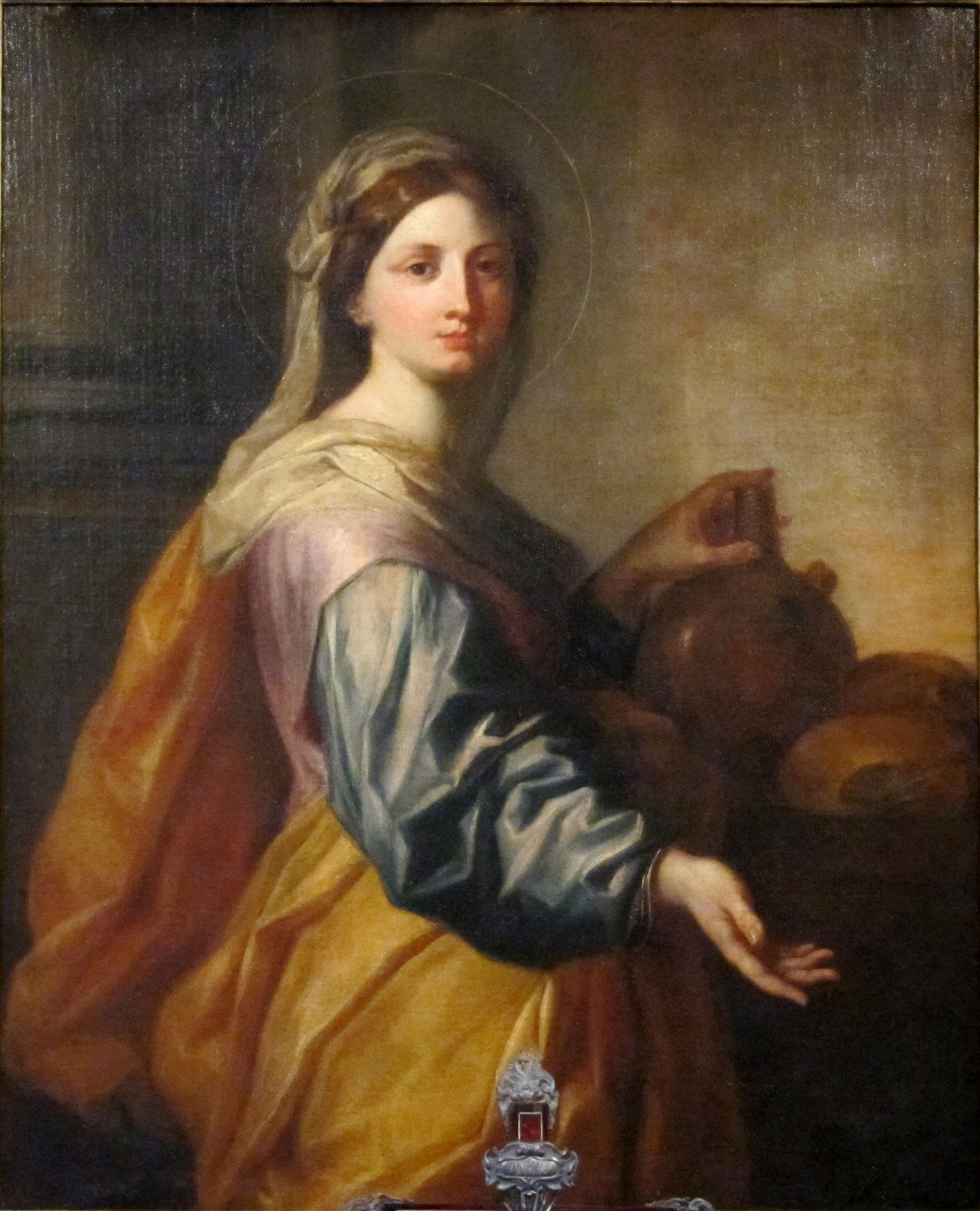 Sainte Zite d'Arnould de Vuez au musée de l'Hospice Comtesse à Lille (Nord).